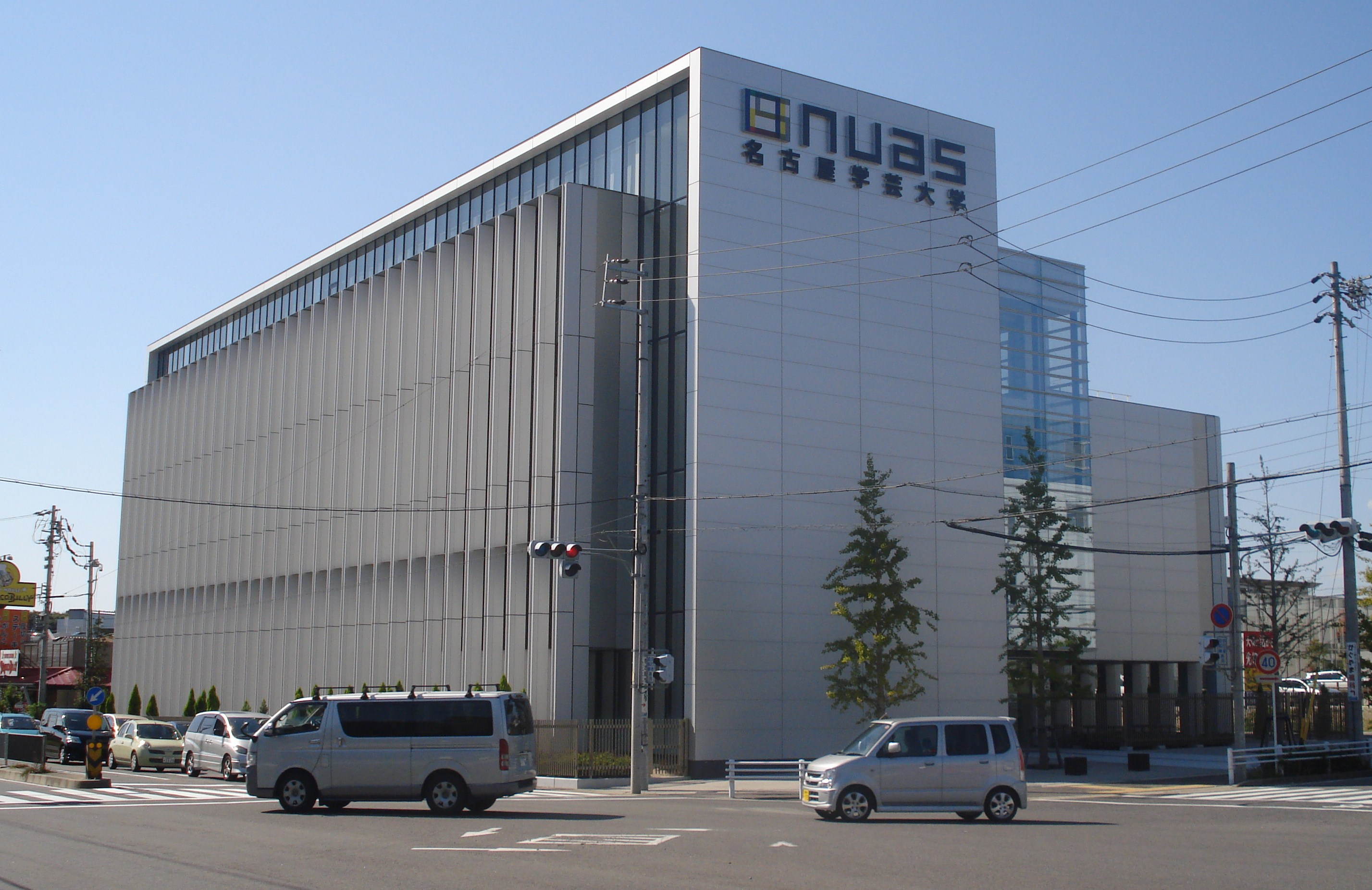 2007年10月 投稿者自身が撮影管理